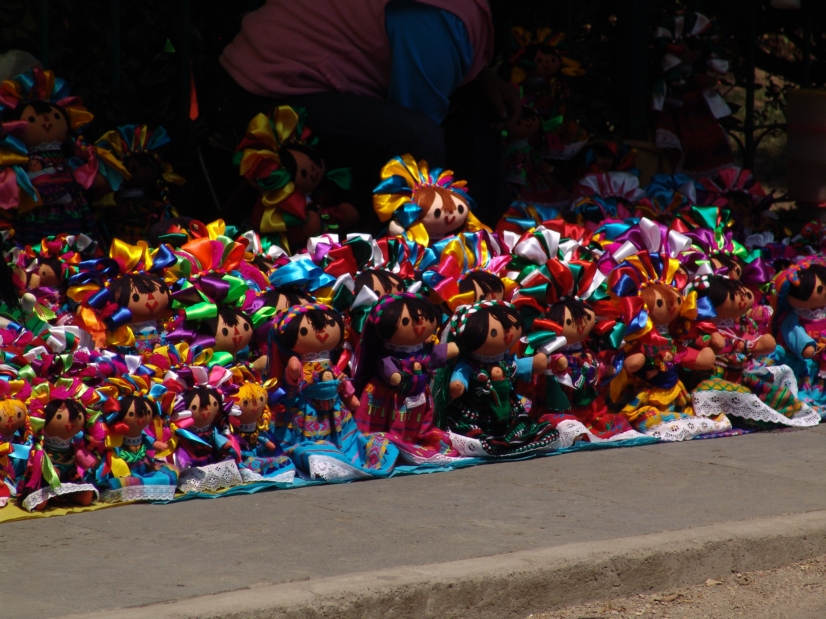 Artesanías originarias del Bazar del Sábado. Ciudad de México, San Ángel, Distrito Federal, Álvaro Obregón.